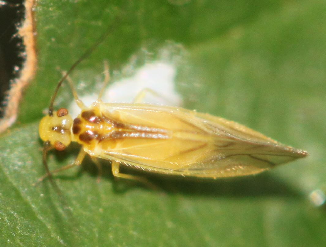 Rindenlaus Valenzuela flavidus am 28.9.2016 in der Schwetzinger Hardt